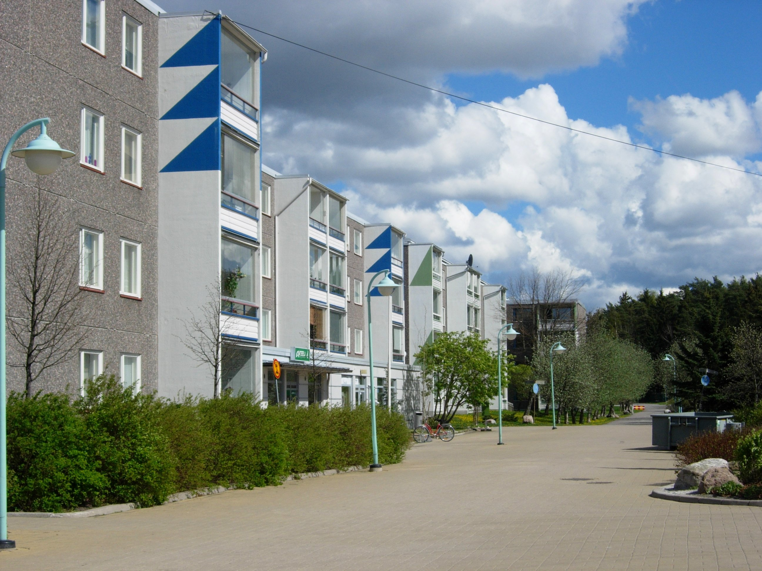 Taloja Lausteen keskuksen vieressä Kirjurinpolulla